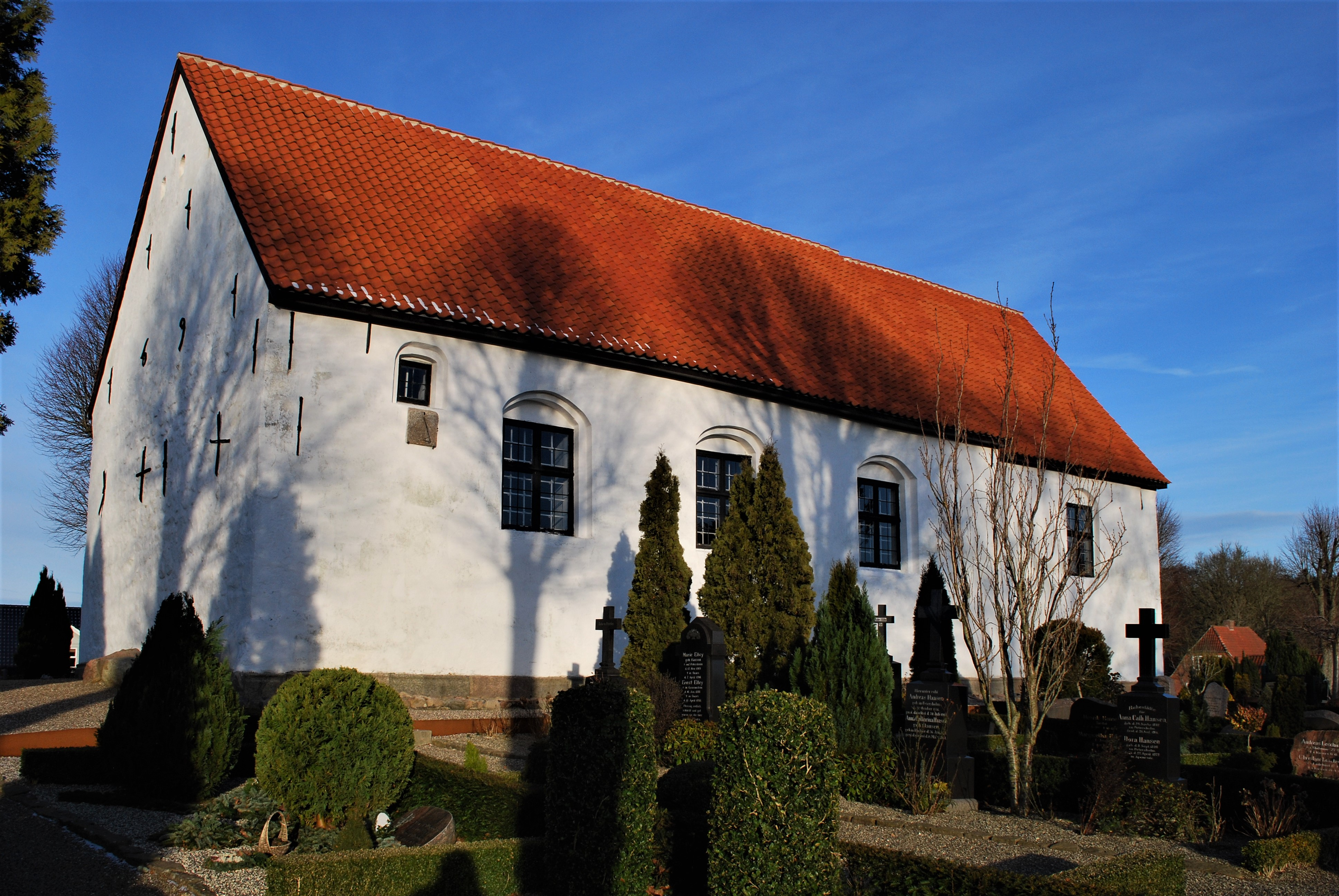 Kværs Kirke, Kværs